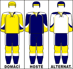 Dresy PSG Zlin, zjednodusena forma.